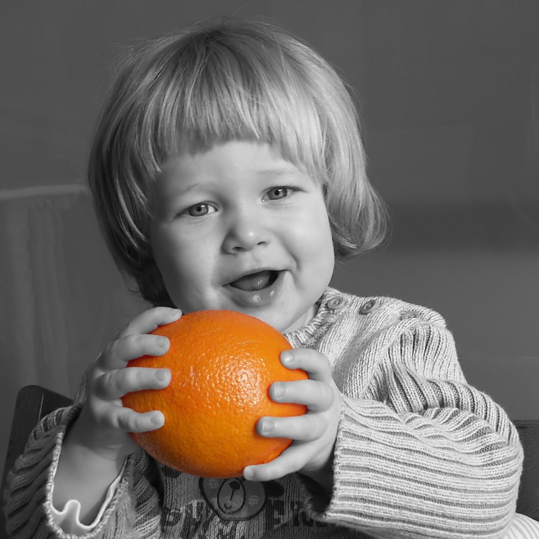 Freistellung, einer Orange in den Händen eines Kleinkindes (16 mon.)